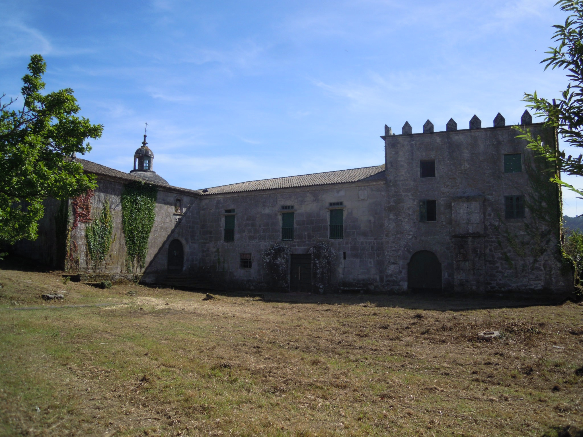 Vista norte do pazo de Cadro, coa capela, o edificio e a torre.